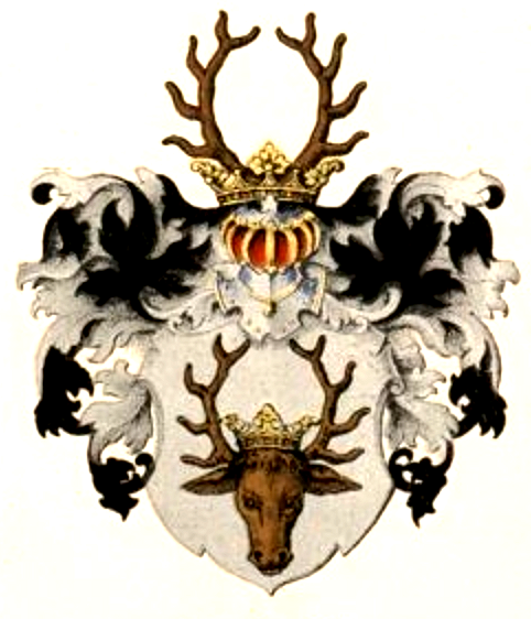 Wappen derer von Brackel im Baltikum